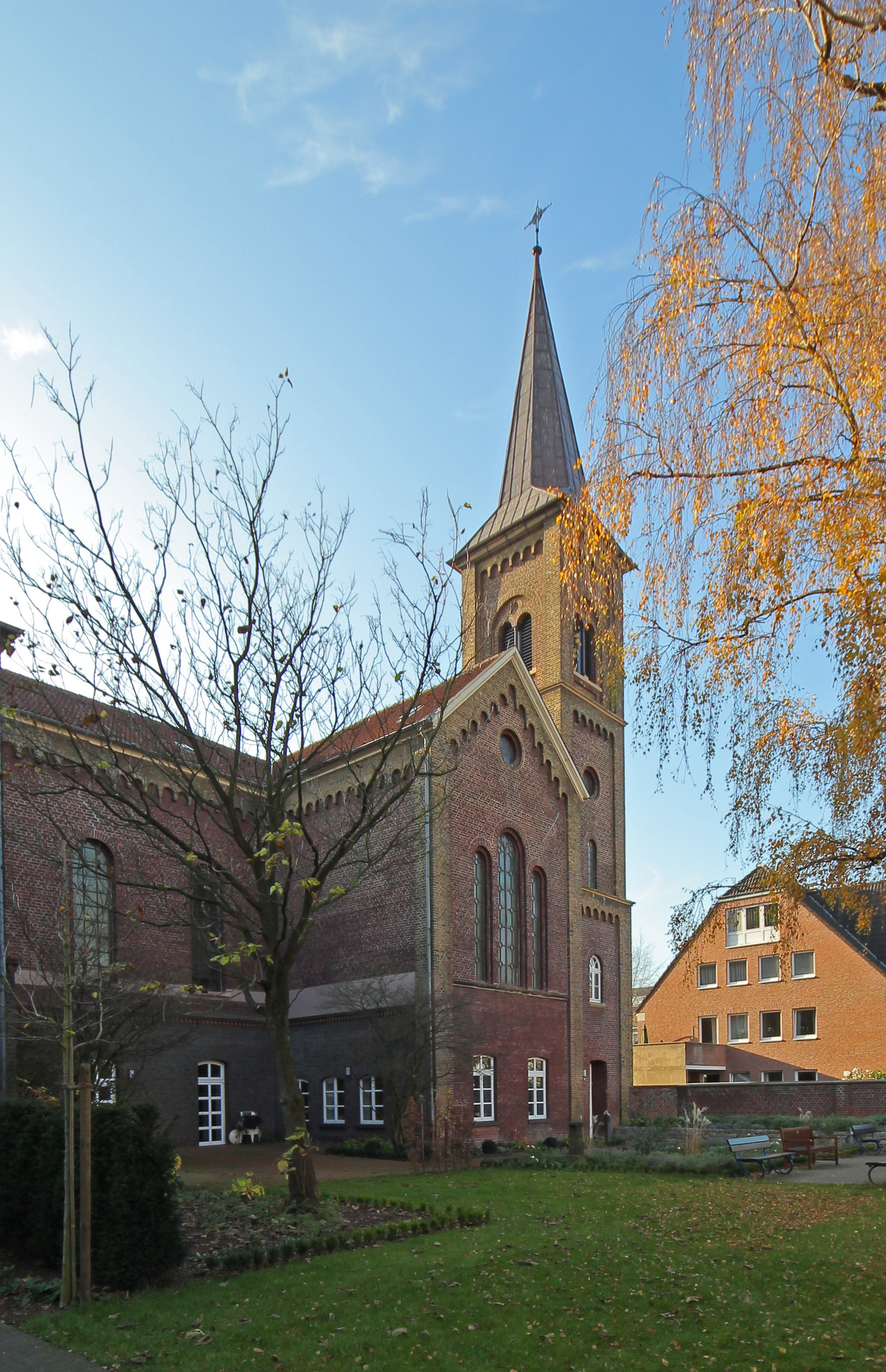 Düsseldorf-Kaiserswerth, evangelische Stammhauskirche in der Kaiserswerther Diakonie